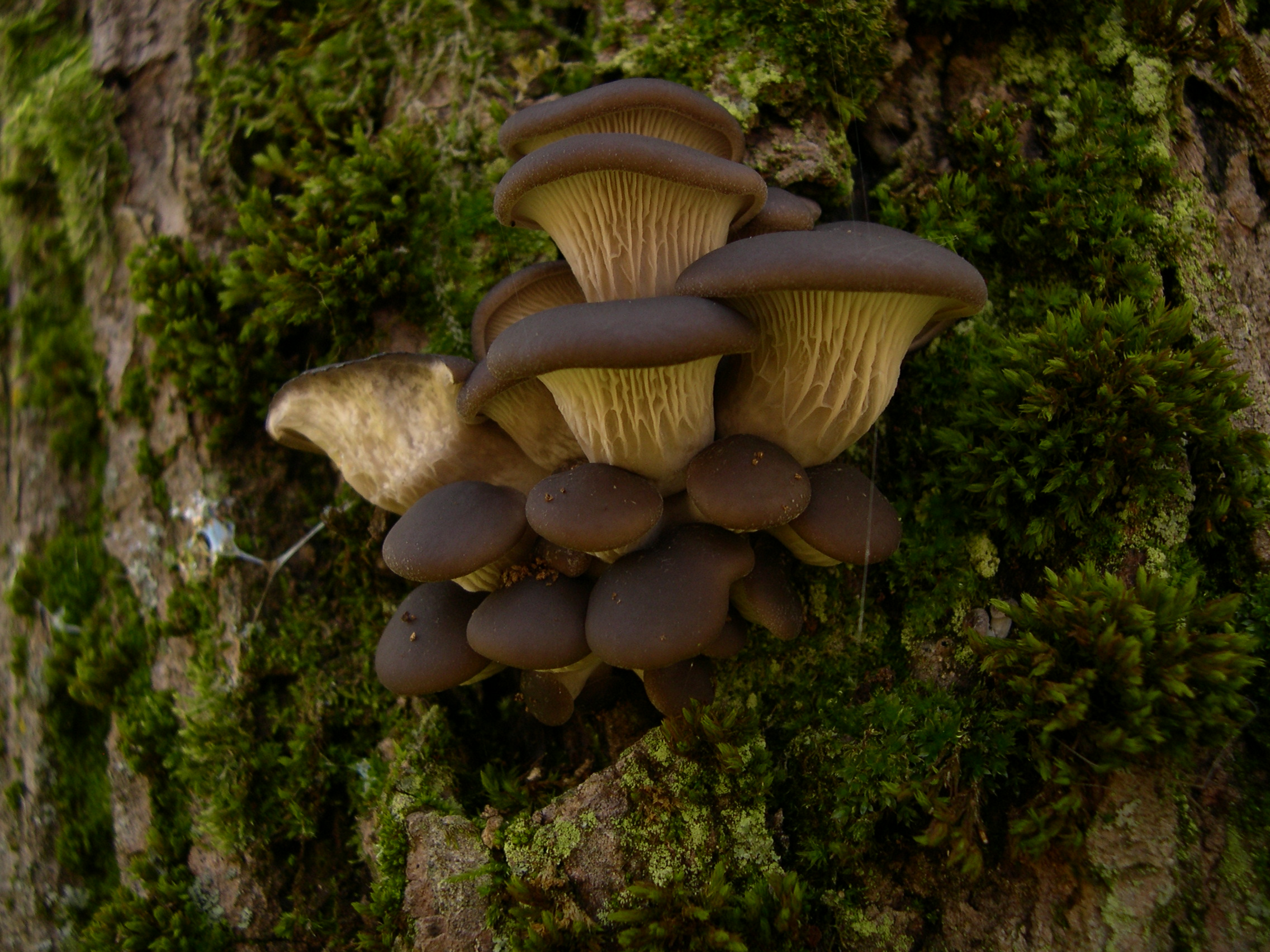 Pleurotus ostreatus